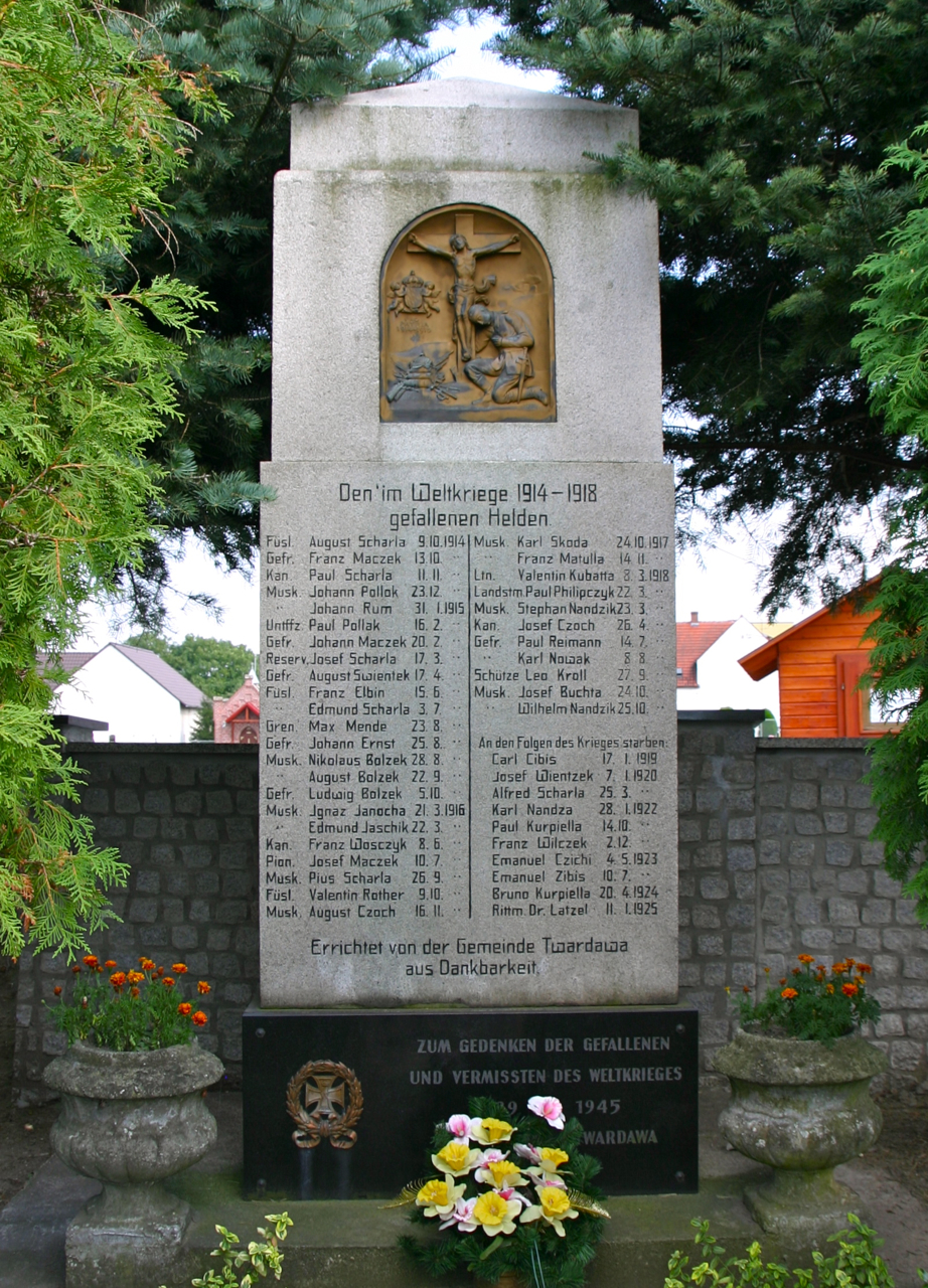 Twardawa – wies w Polsce położony w województwie opolskim, w powiecie prudnickim, w gminie Głogówek.